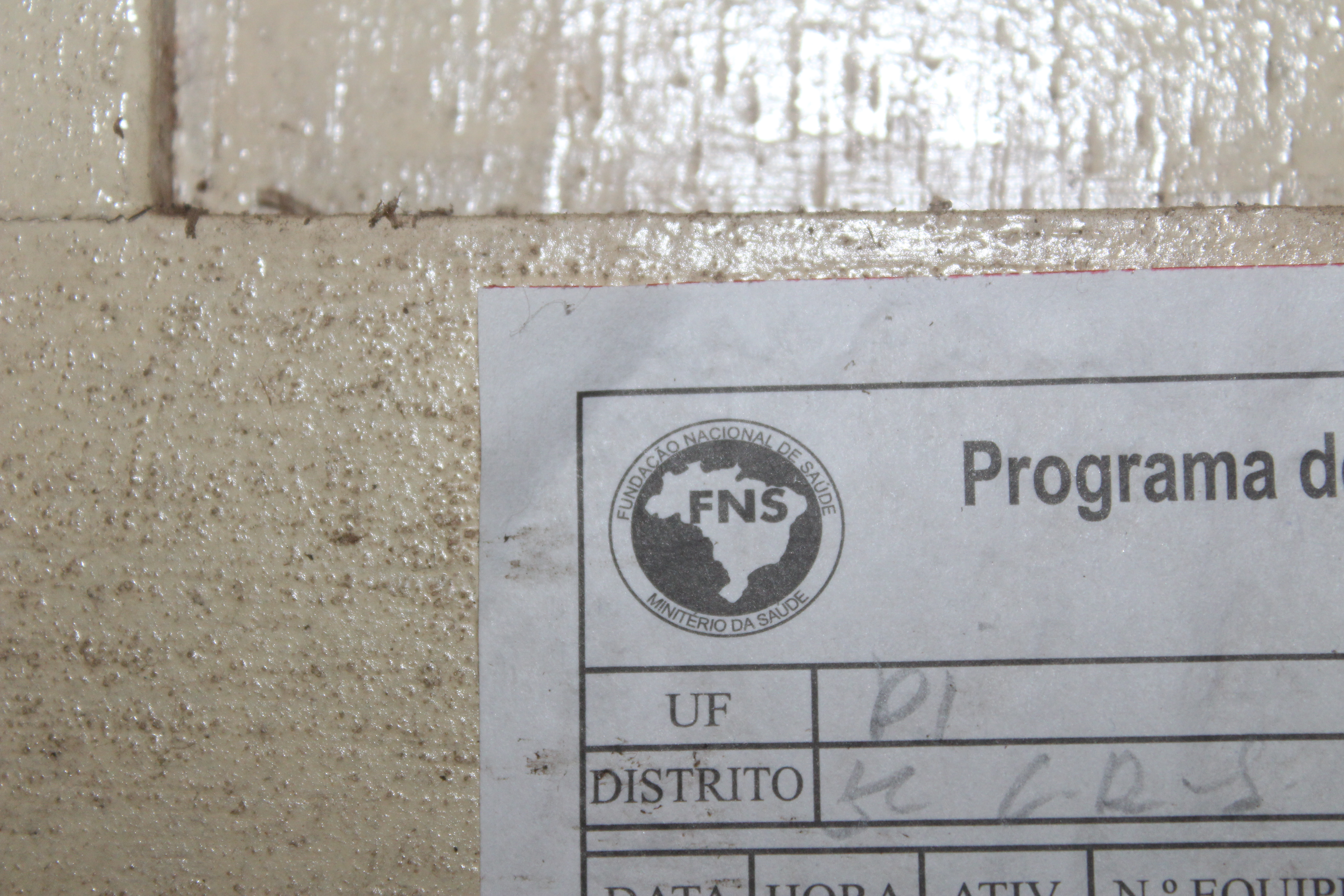 Ficha de controle da febre amarela e dengue com o antigo emblema da Fundação Nacional de Saúde do Brasil.